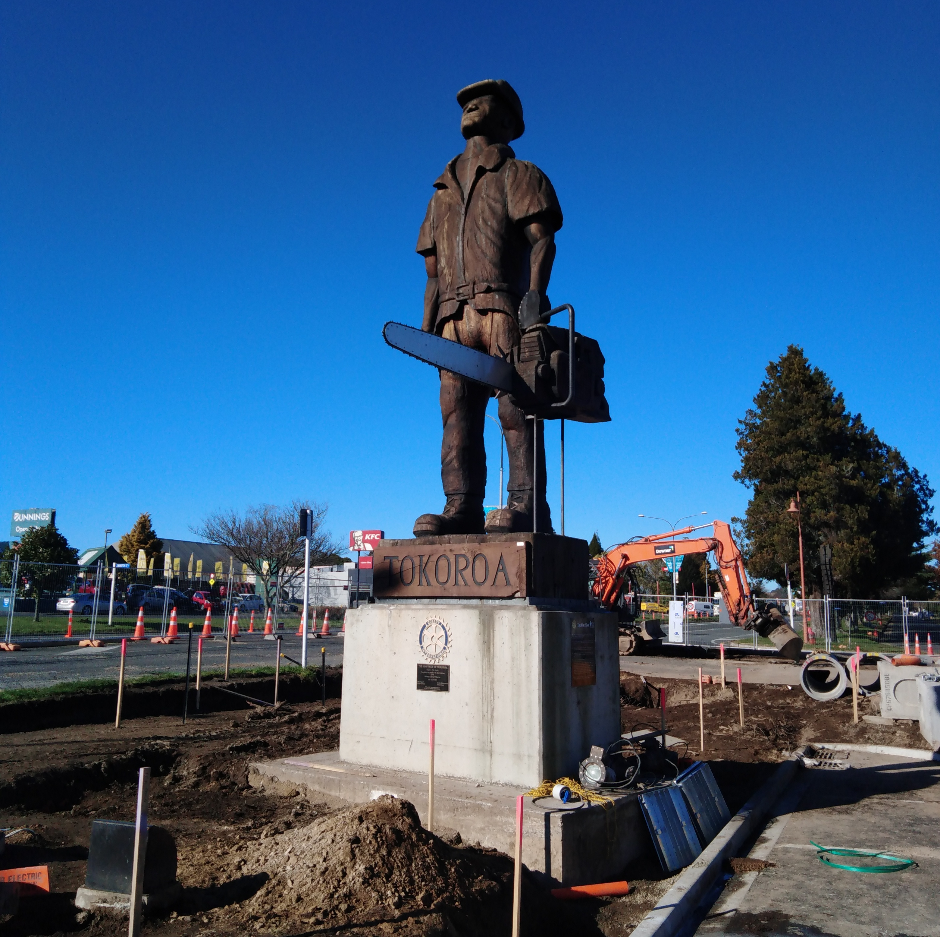 'Pine man', escultura en Tokoroa